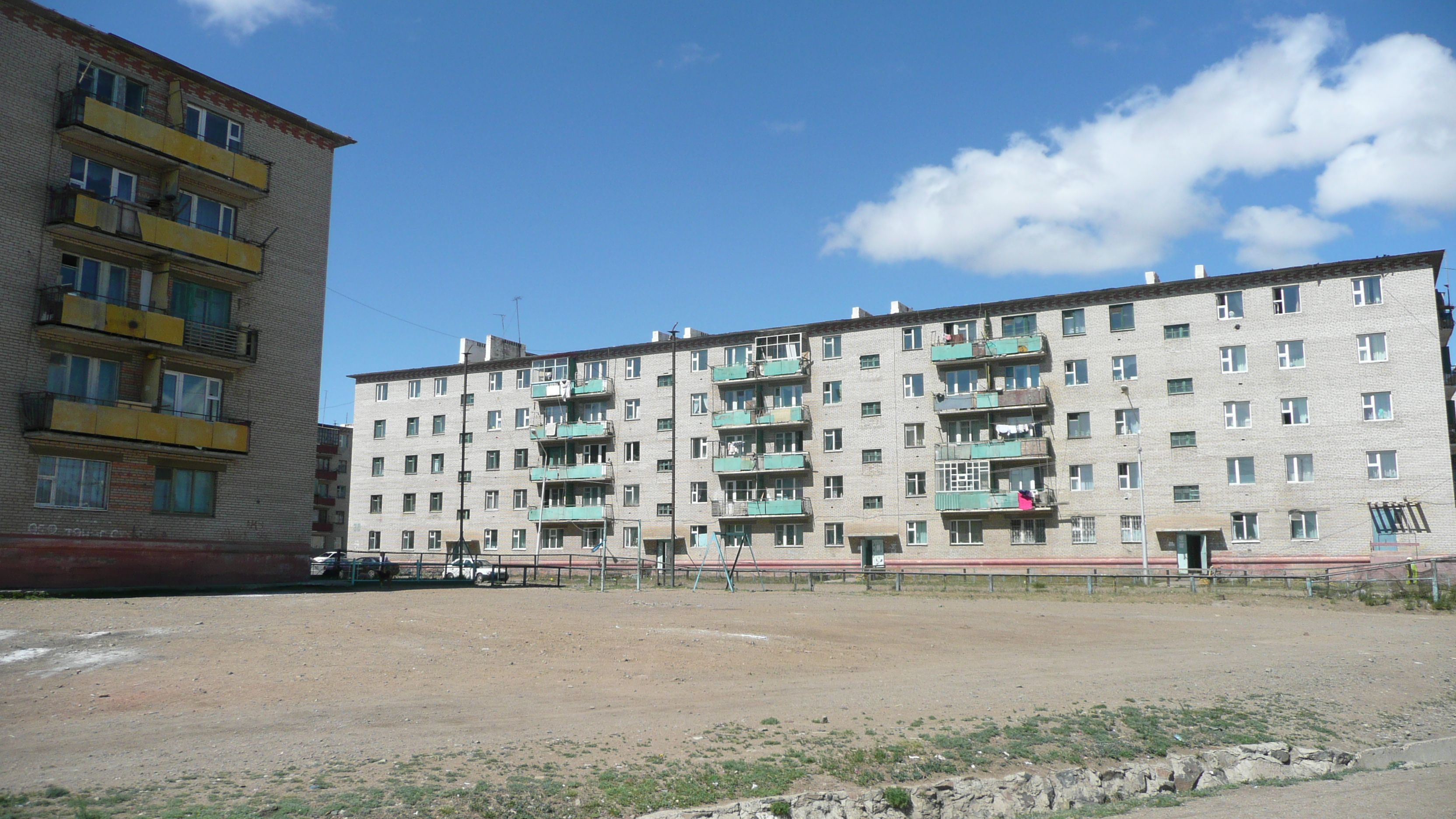 Wohnhäuser in der Bergbaustadt Nalaikh in der Nähe von Ulan Bator